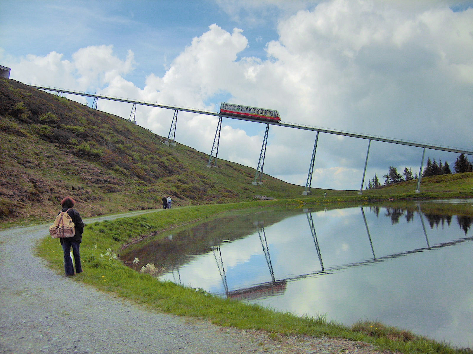 Hartkaiserbahn auf der Brücke kurz vor der Bergstation